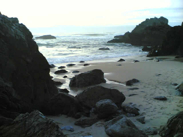 Praia da adraga, Sintra, Portugal